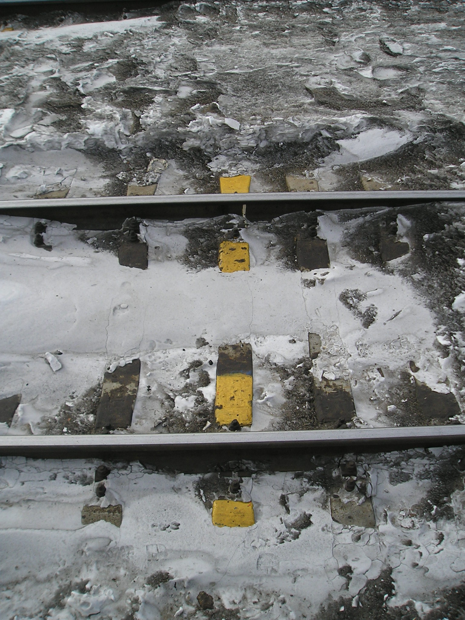 Маячная шпала, служащая для контроля за бесстыковым путём.